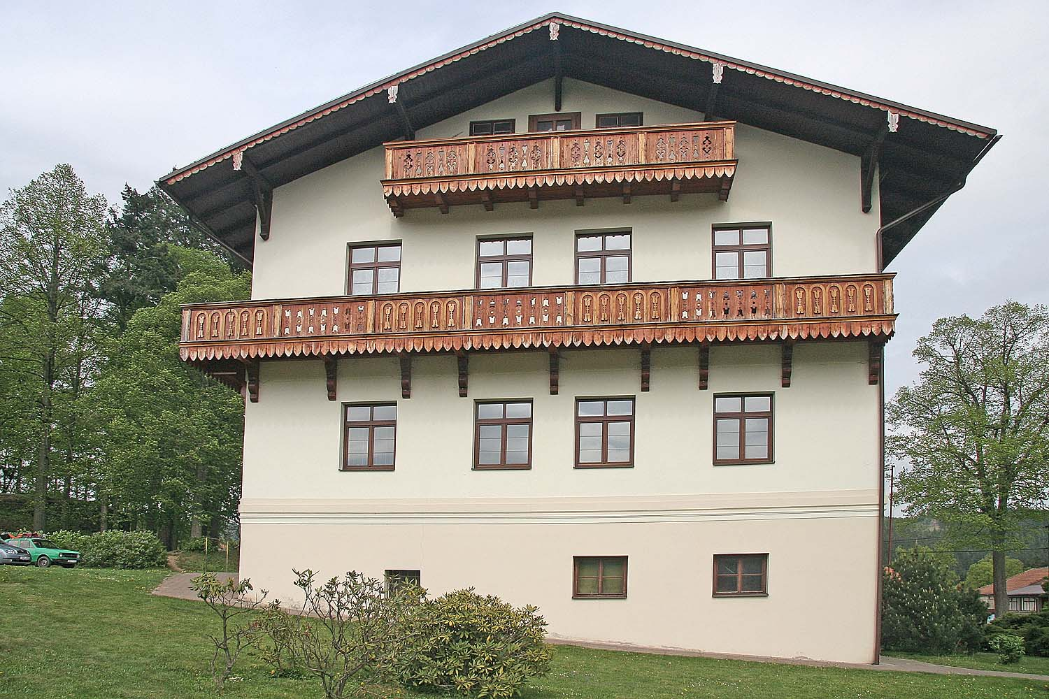 Dalečín - zámek, okres Žďár nad Sázavou